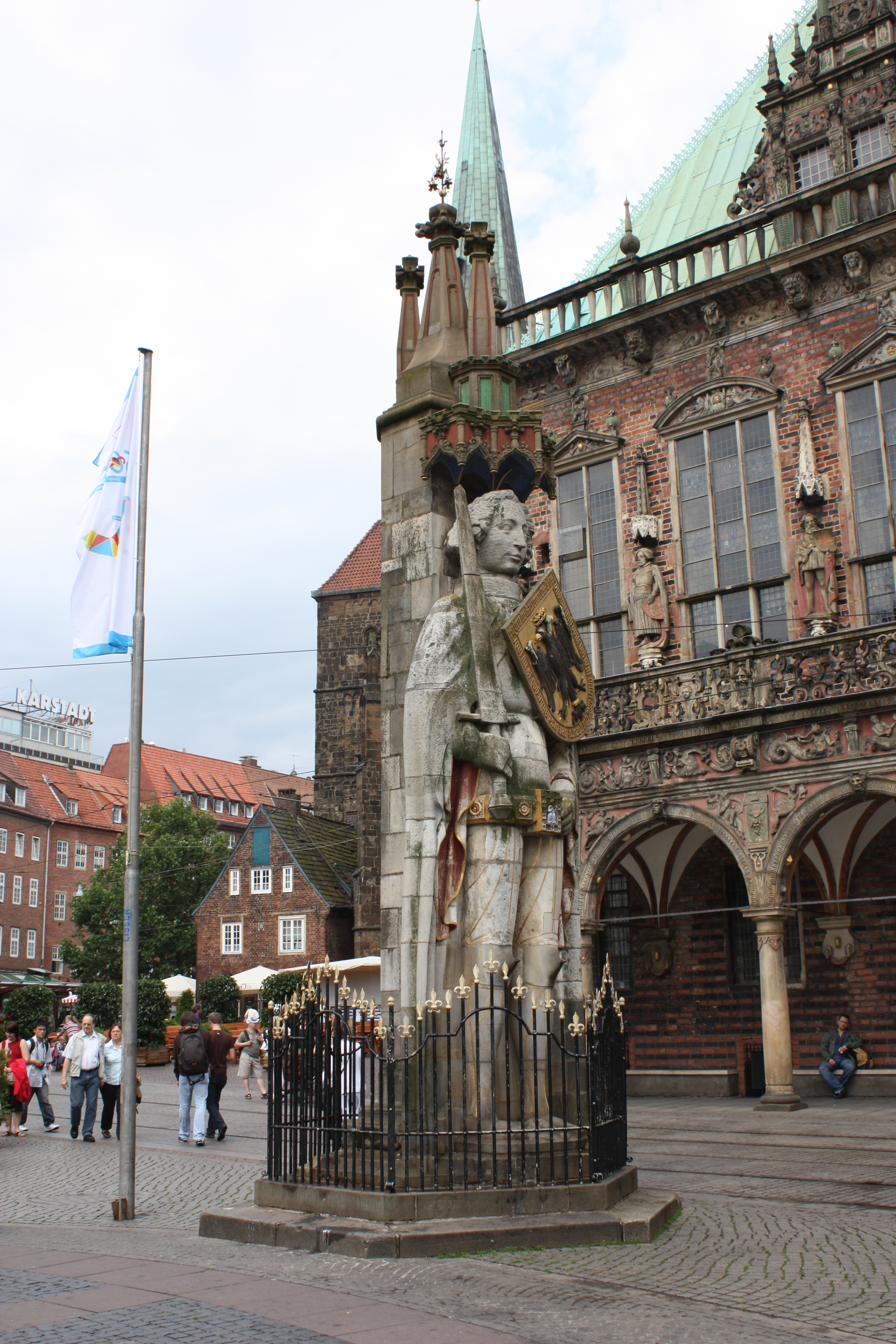 Bremer Roland; 2009